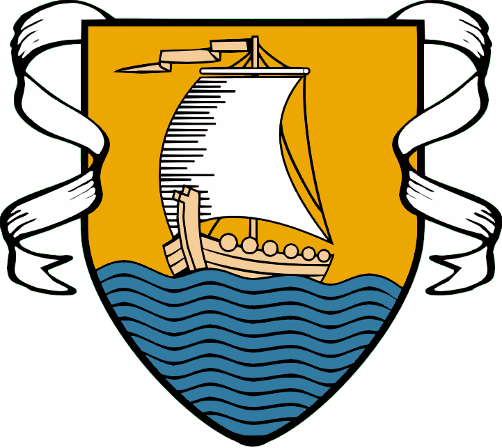 Logo von Baabe